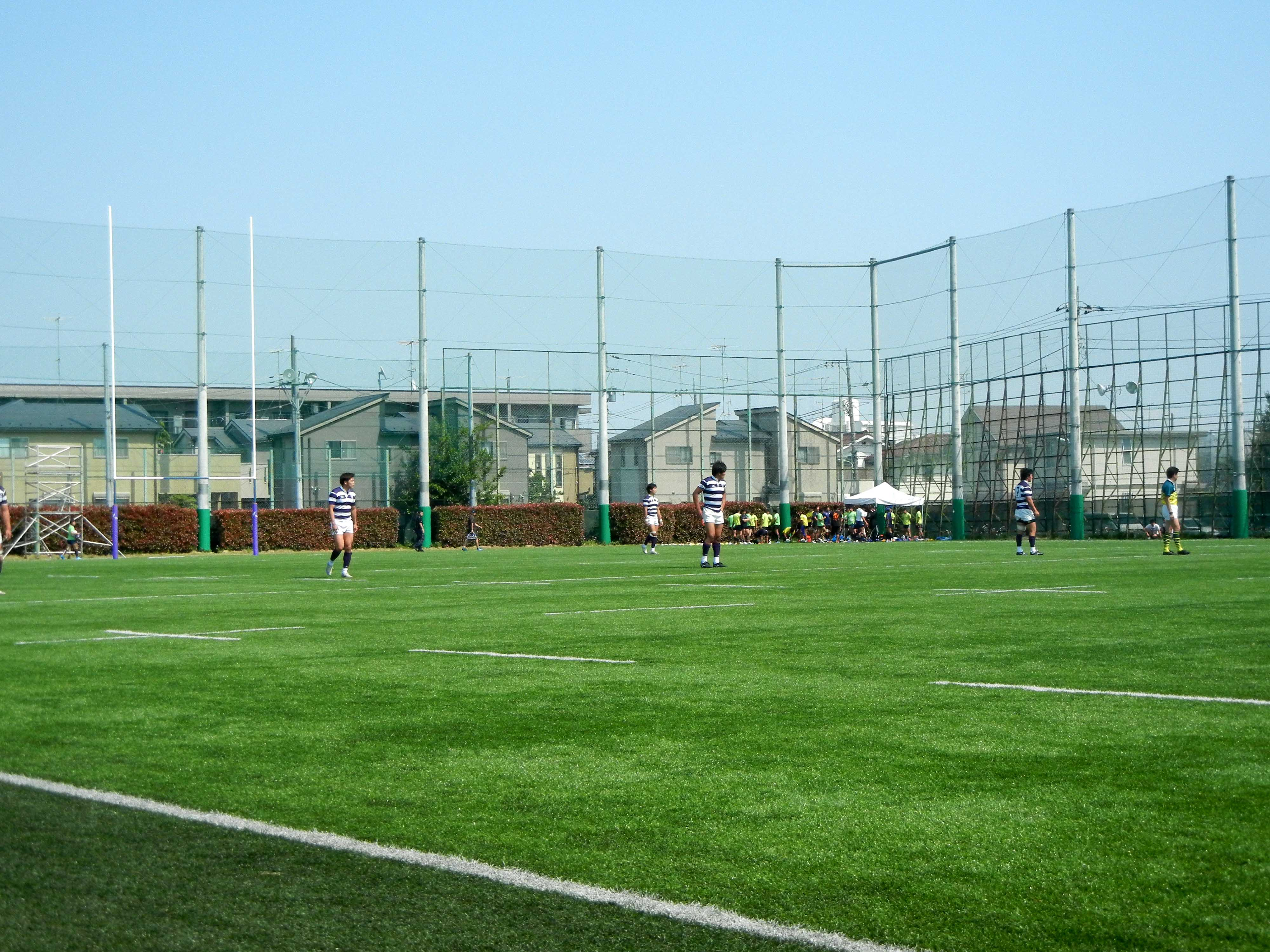 明治大学八幡山グラウンド